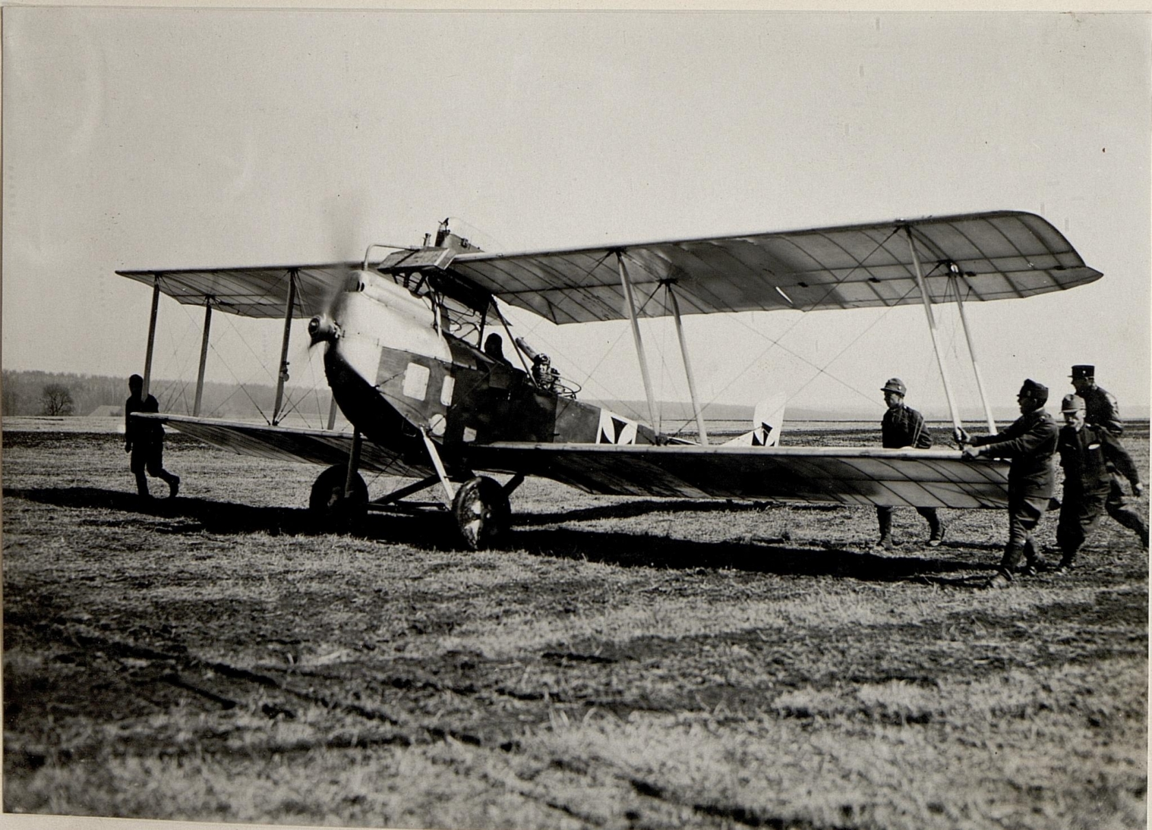 Am Flugplatz Landung des Apparates in Kragla